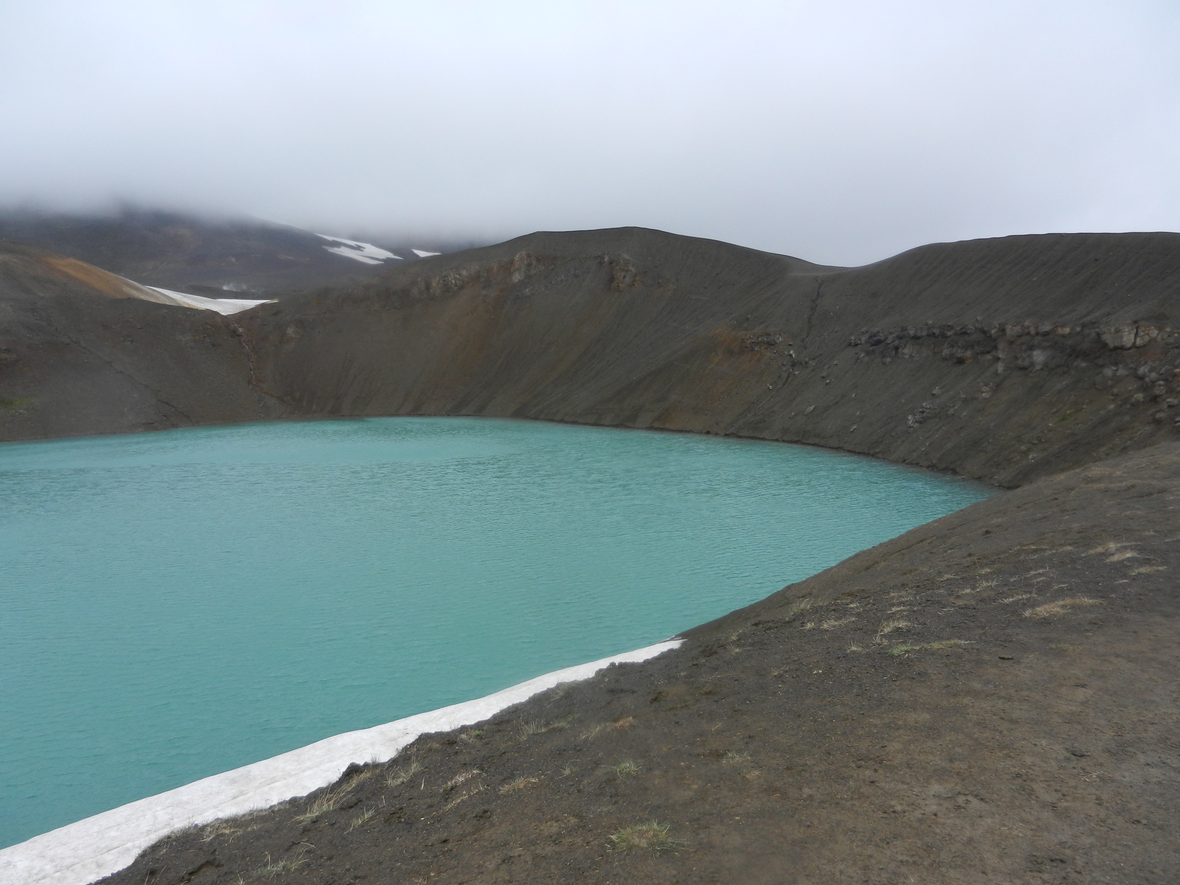 Krater Viti, Mývatn, islandija.